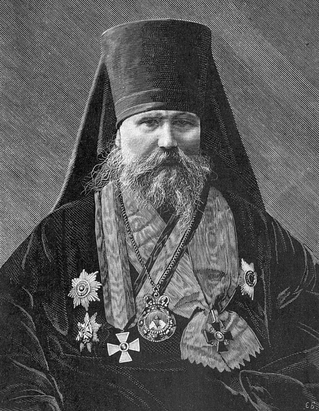 Павел (Лебедев), епископ Русской православной церкви